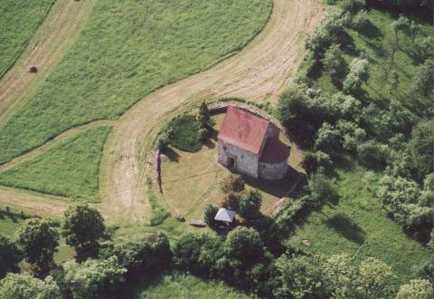 Váraszó, Hungary, aerialphotography. Magyarok Nagyasszonya római katolikus templom This is a photo of a monument in Hungary, Identifier: 5876